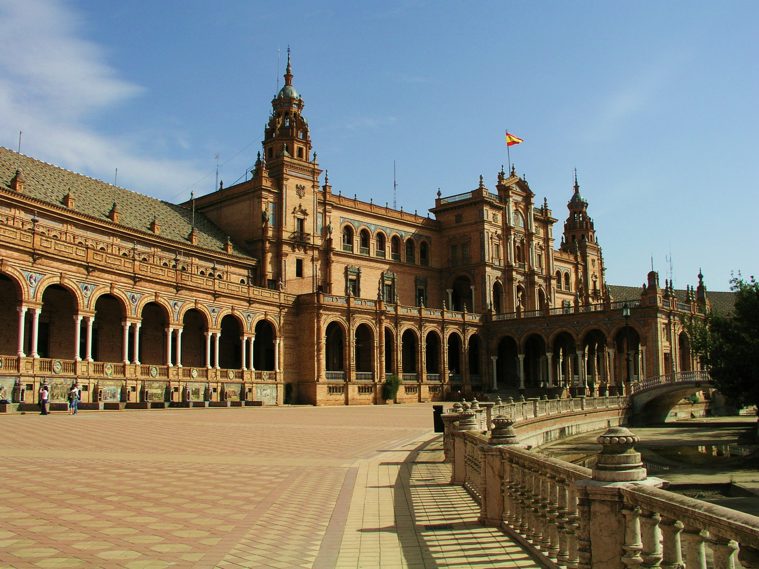 Spaanse Plein in Sevilla